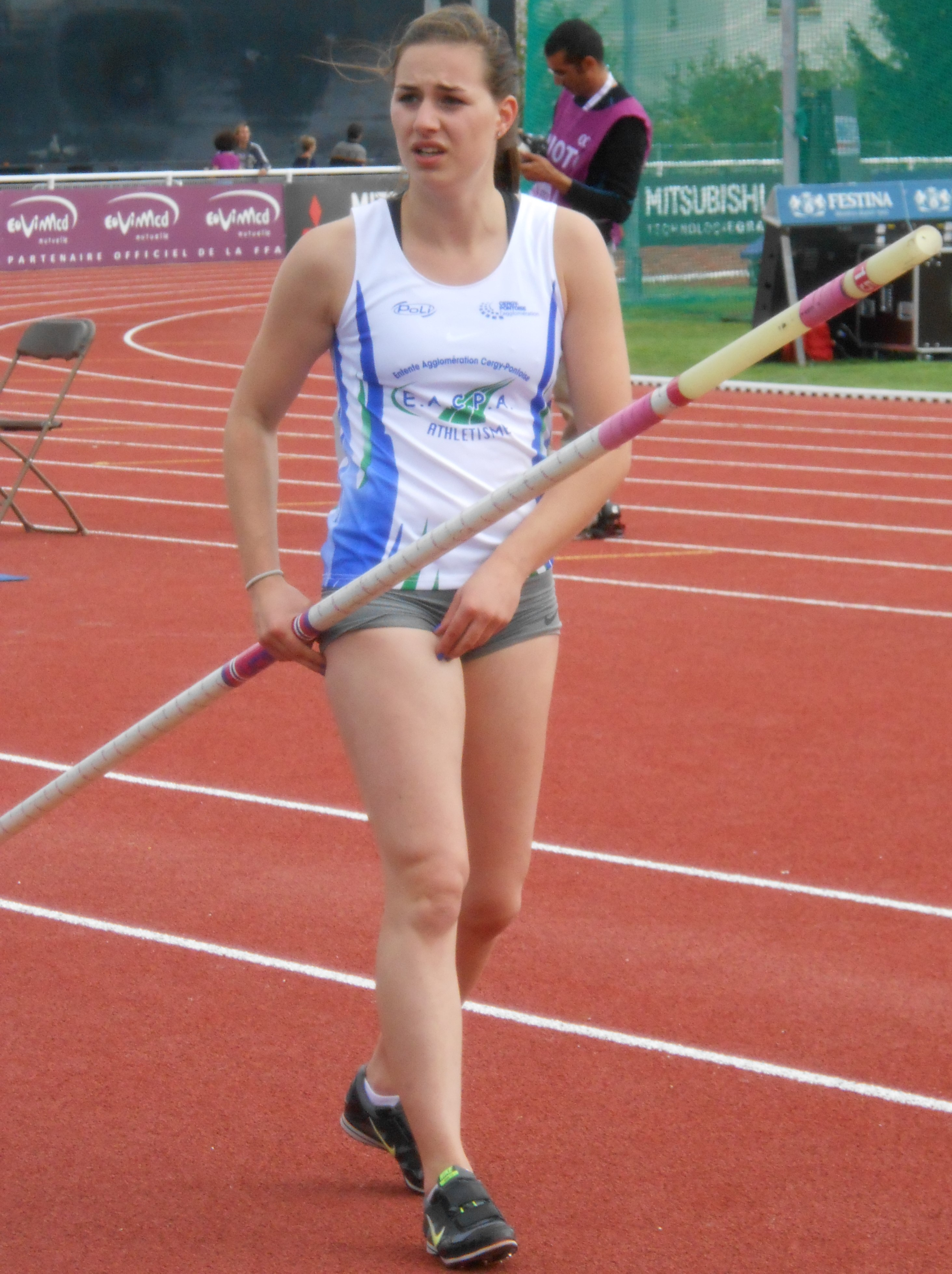 Ninon Guillon-Romarin lors des championnats de France d'athlétisme 2014 à Reims.